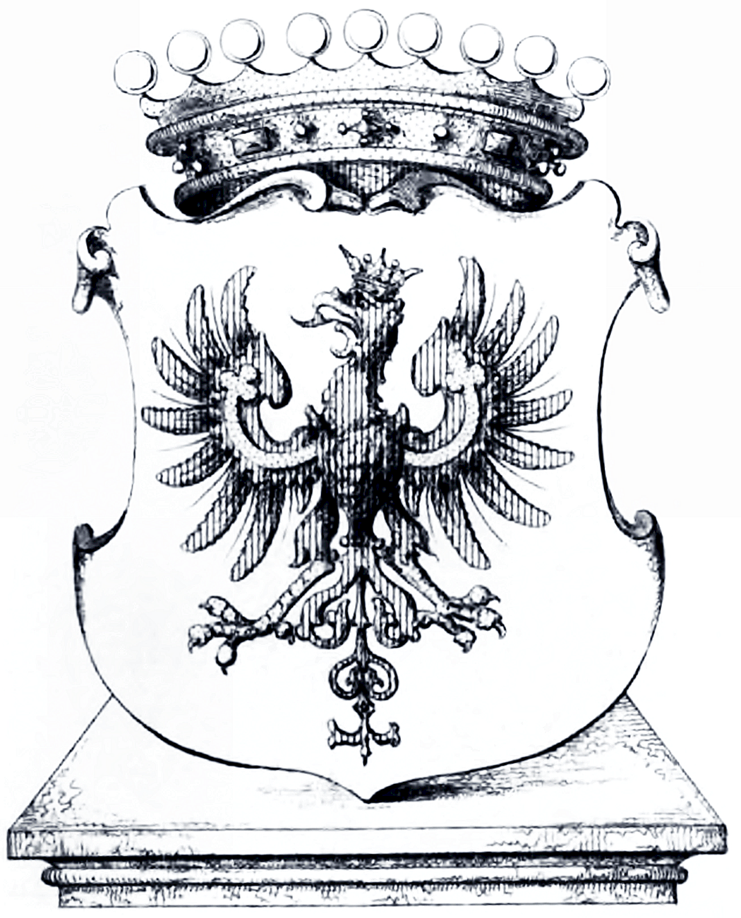 Wappen der Grafen von Meran (1850)